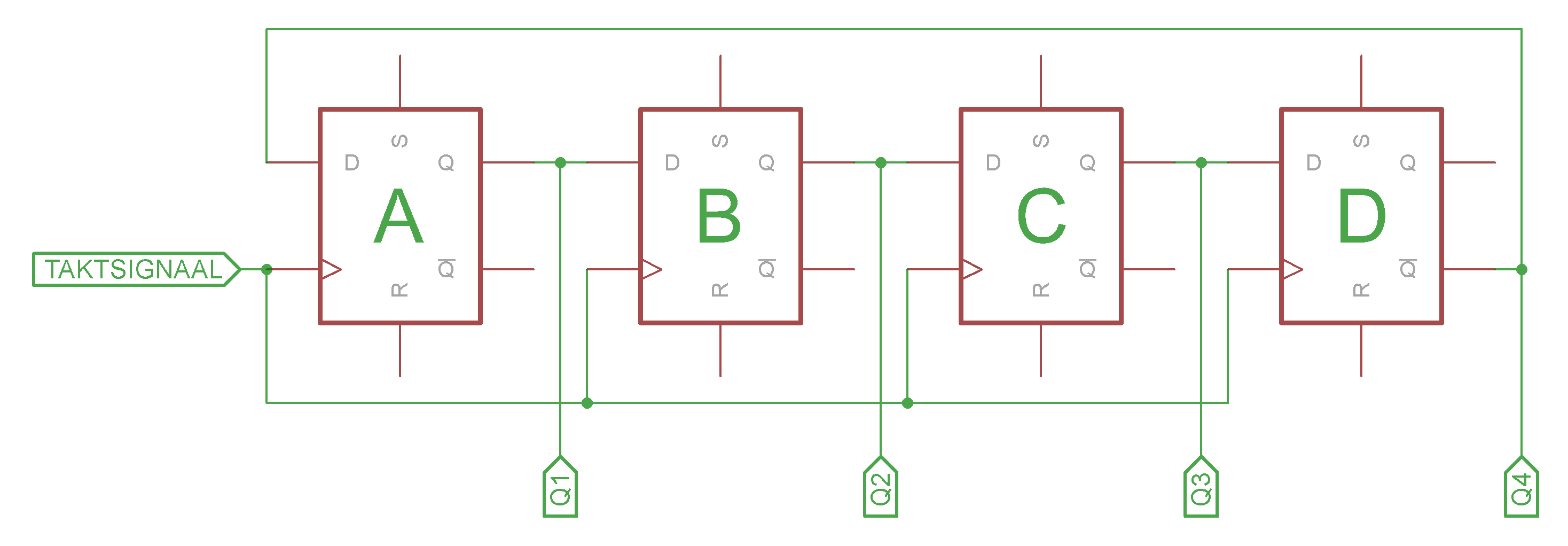 D-trigeritest koostatud inverteeritud tagasisidega 4-bitine ringloenduri elektriskeem. Johnsoni loendur.